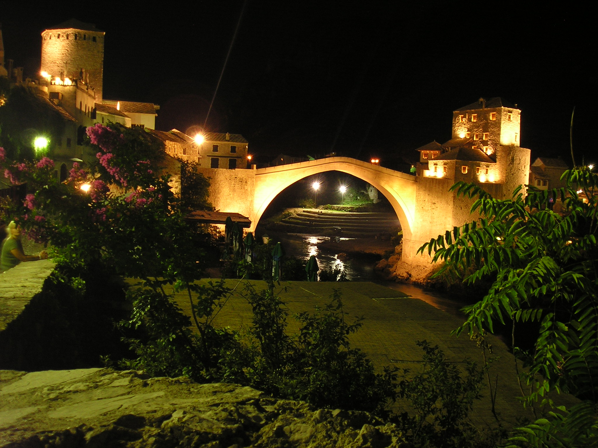 Stari Most